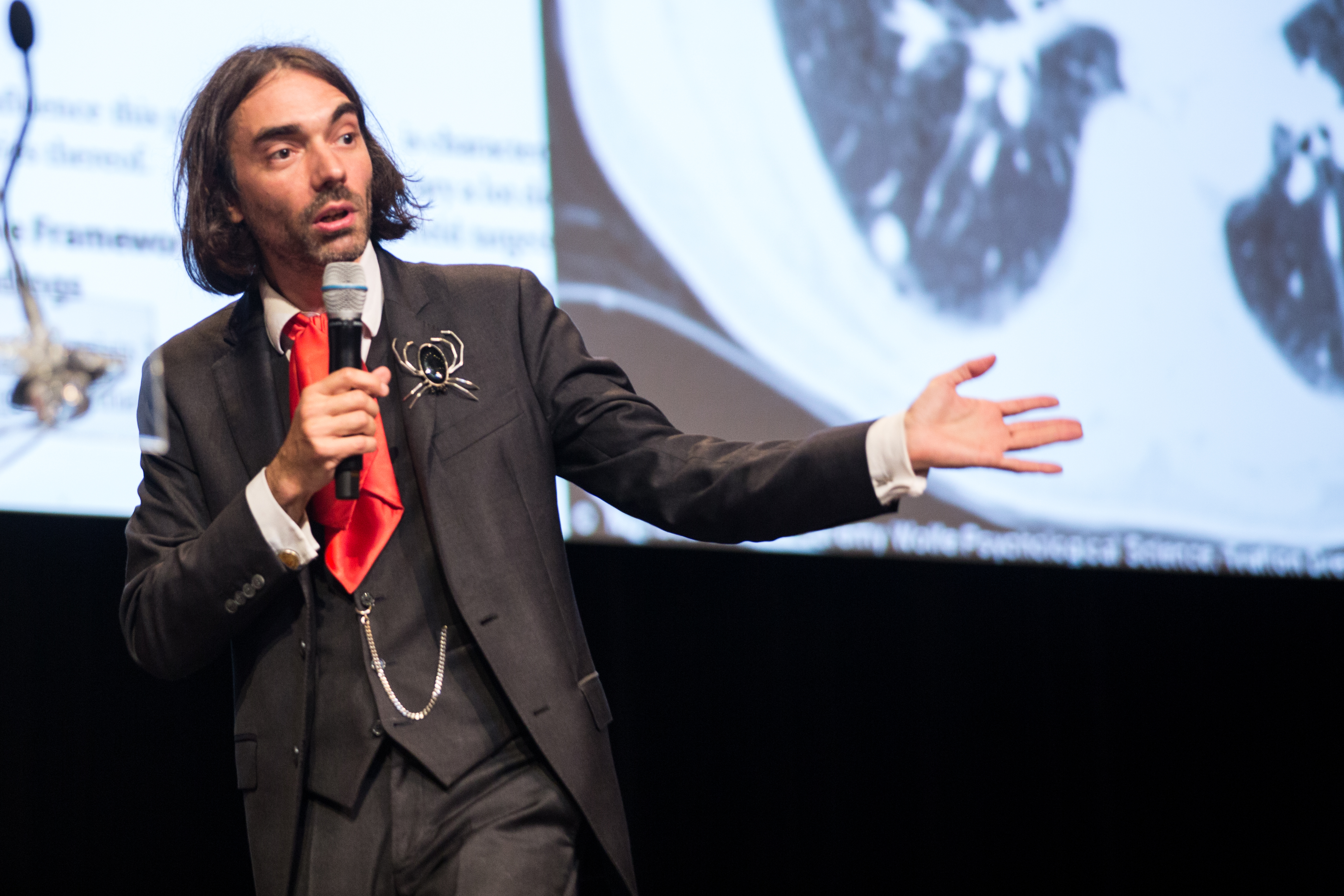 Crédit photographique : © École polytechnique - J.Barande